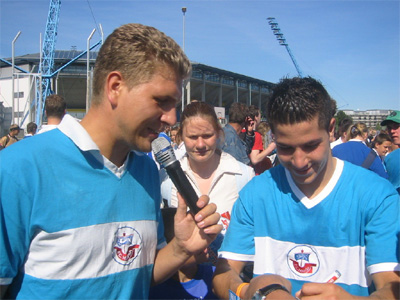 Amir Shapourzadeh (rechts) beim Saieonauftakt 2005/06 von Hansa Rostock